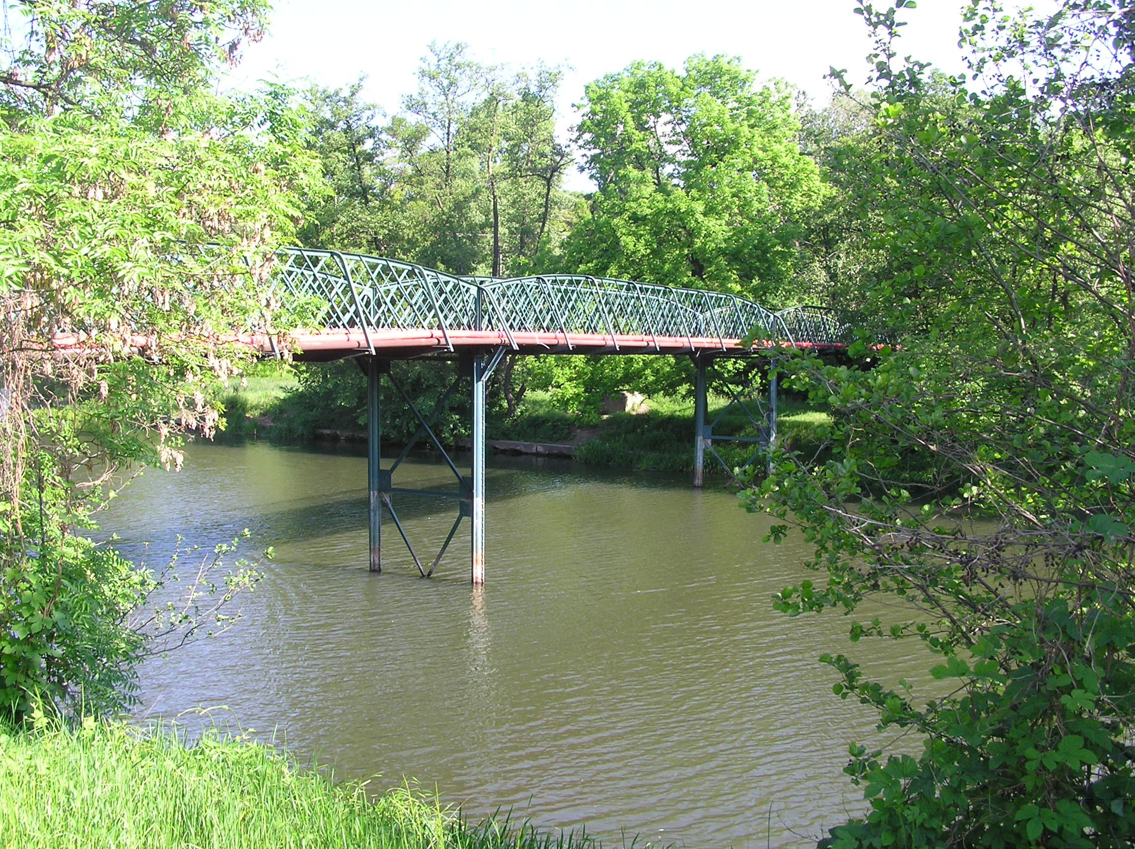 Wrocław, Las Rakowiecki, Kładka Siedlecka